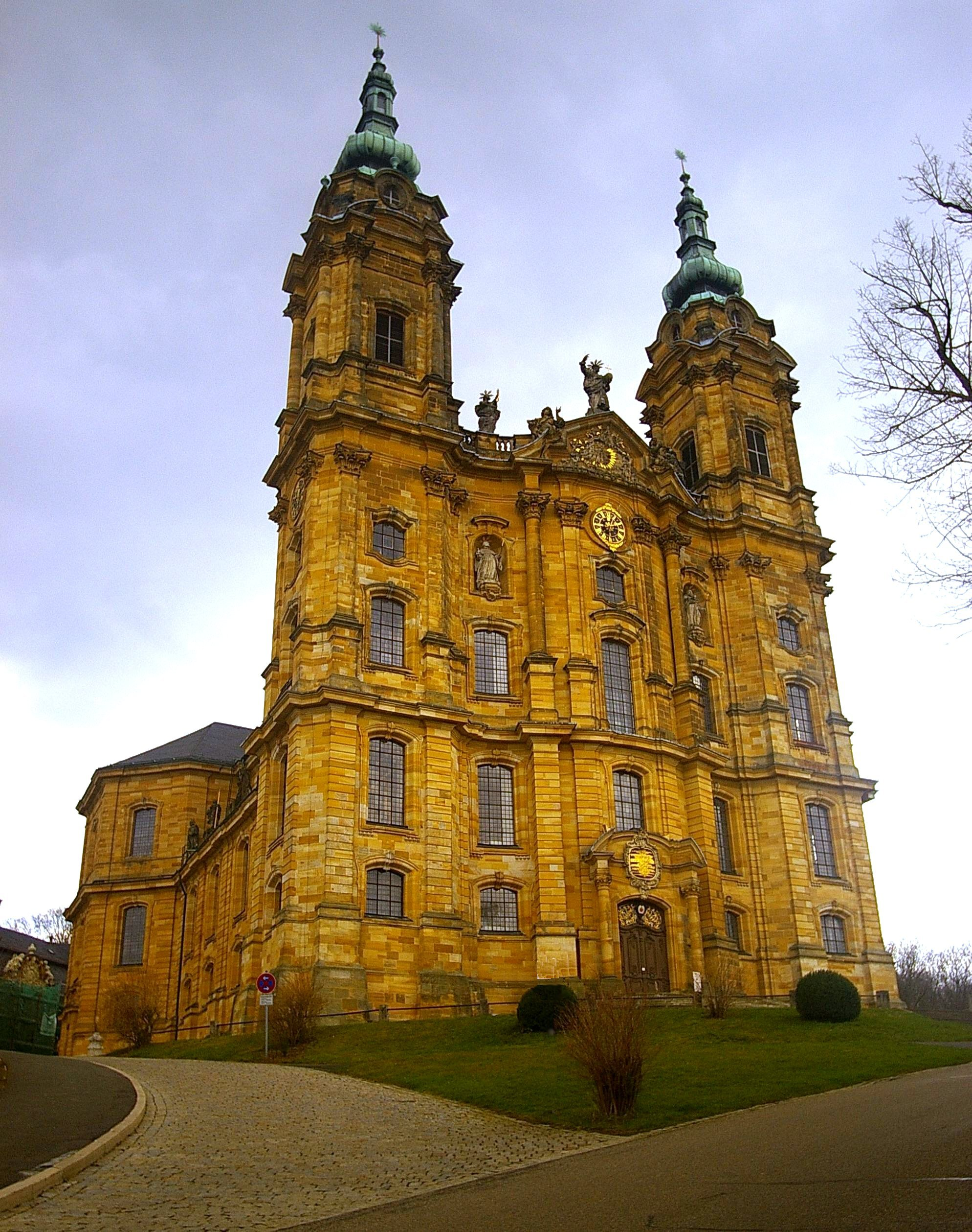 Klosterkirche Vierzehnheiligen außen